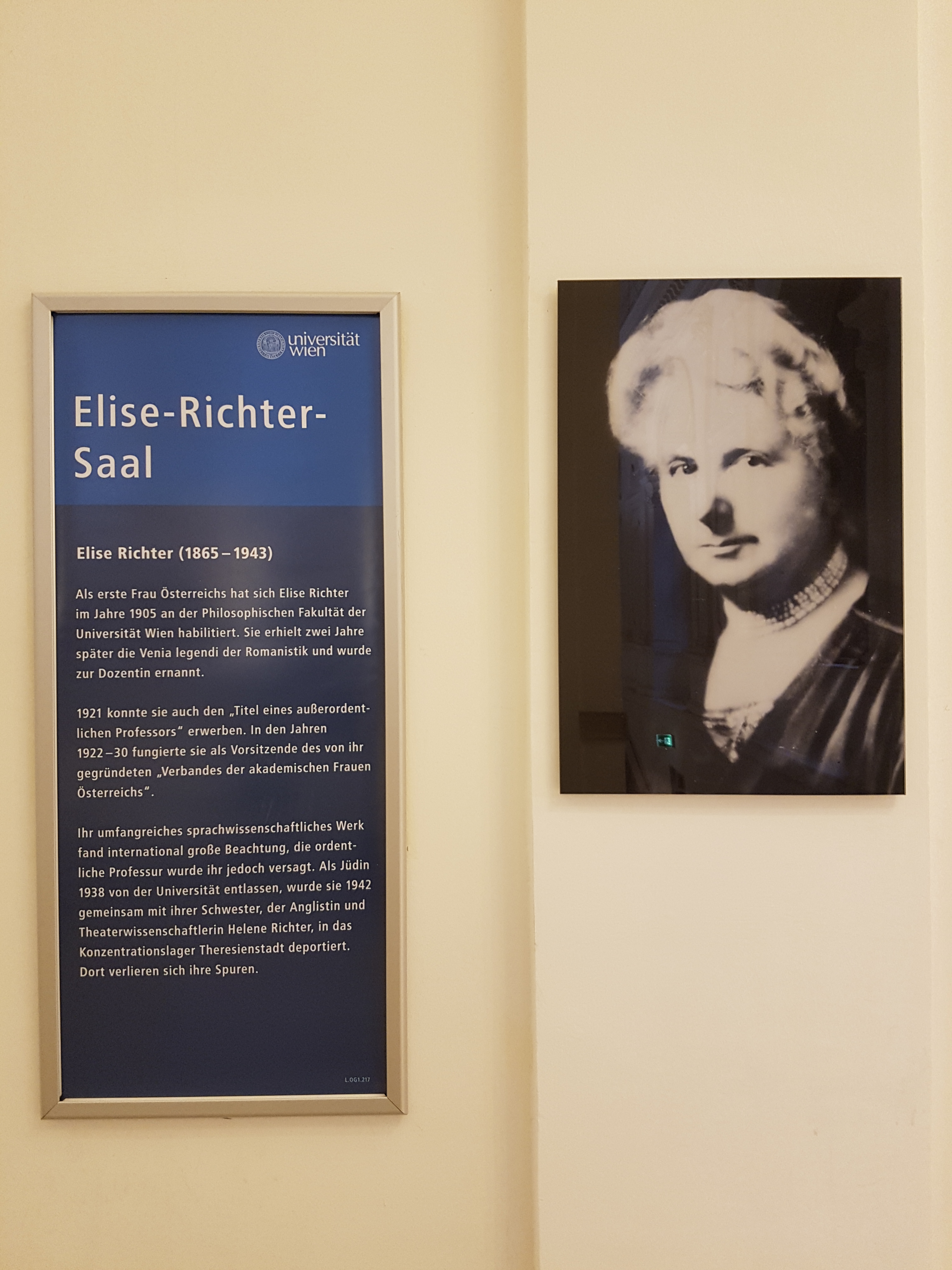 Gedenktafel für NS-Opfer (Wien, Universitätsring 1, Elise Richter) vor dem Elise-Richter-Hörsaal